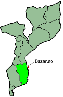 Map Bazaruto